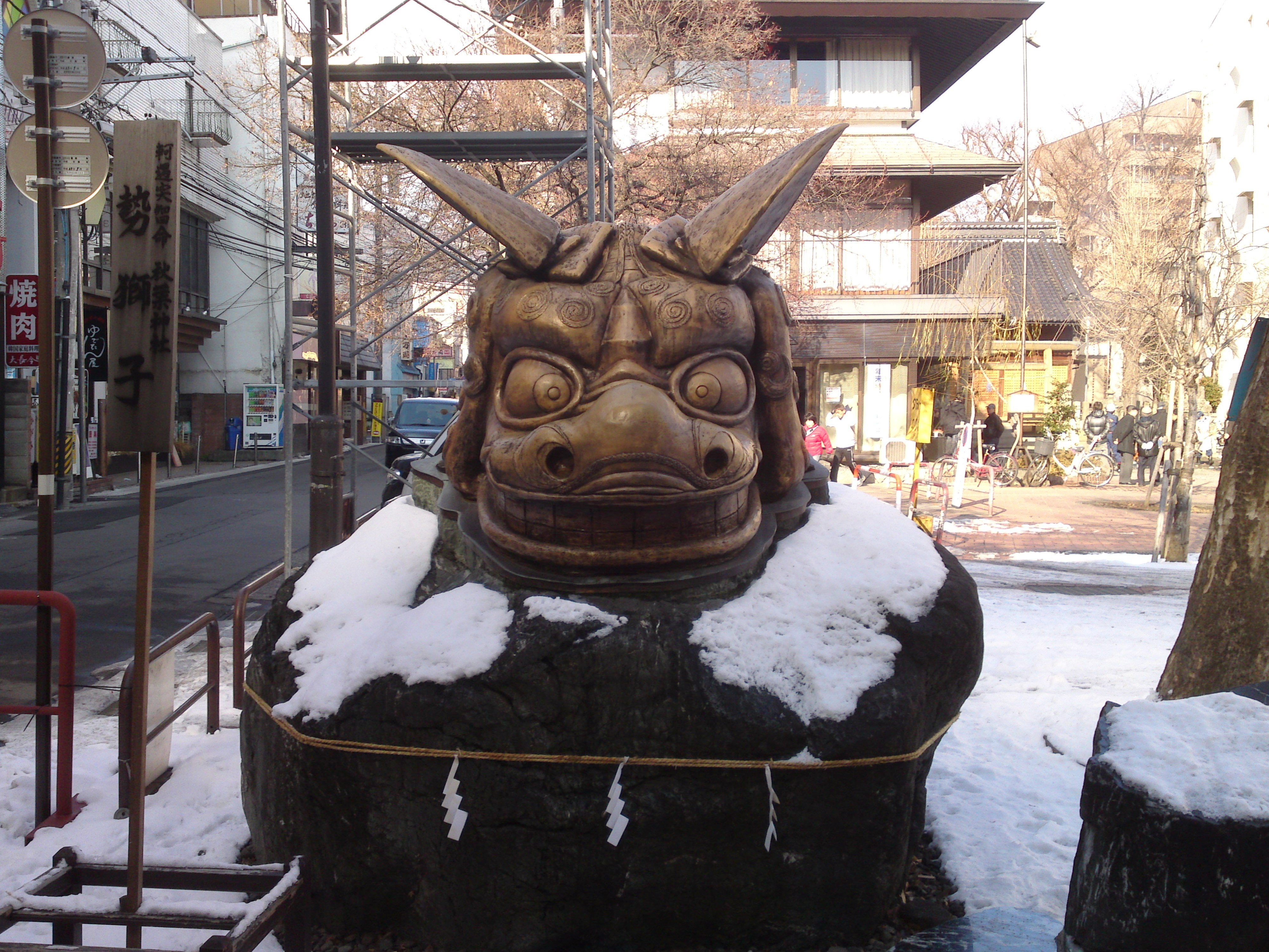 勢獅子（長野市権堂町）